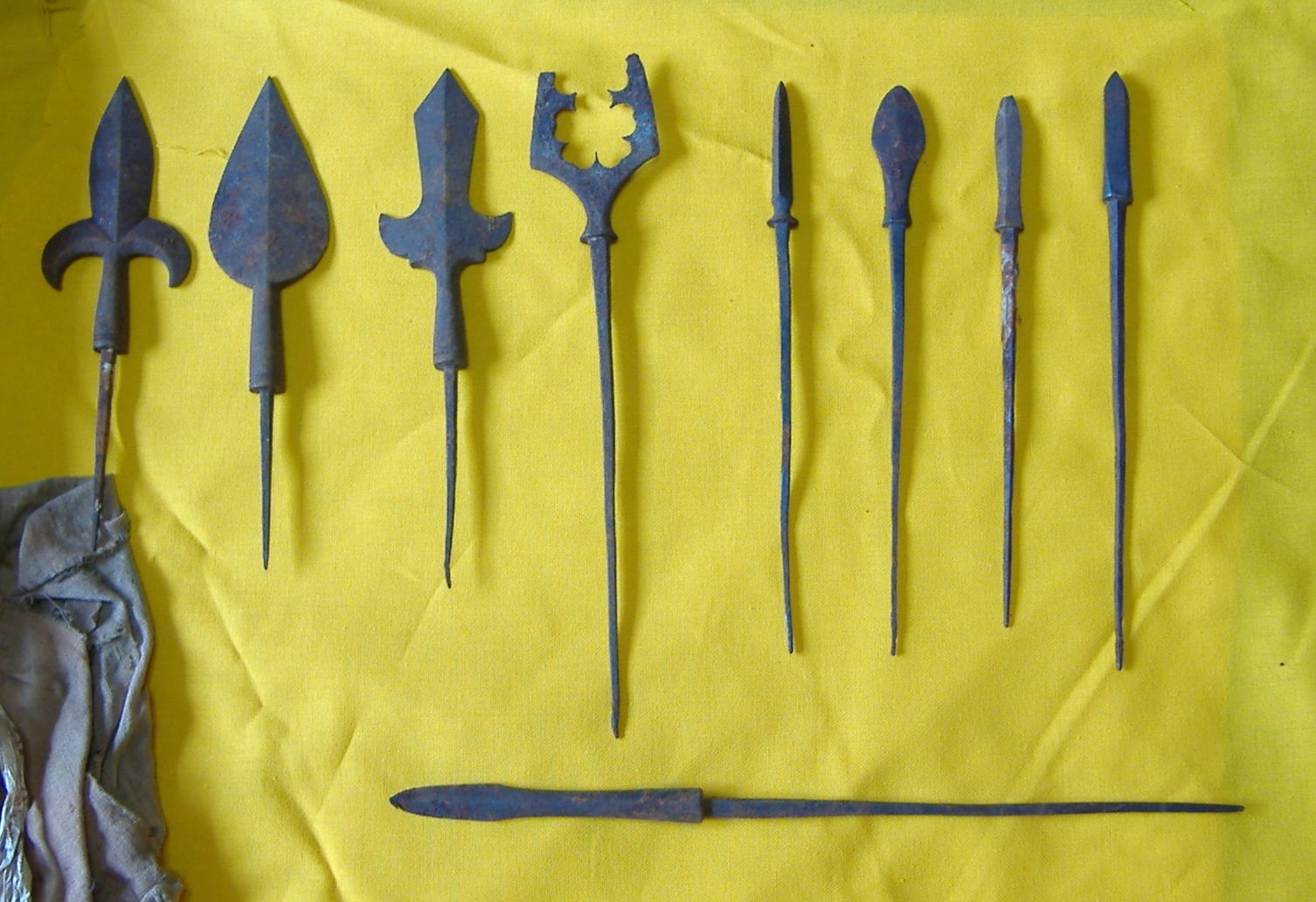 田村麻呂が奉納したと伝えられているやじり